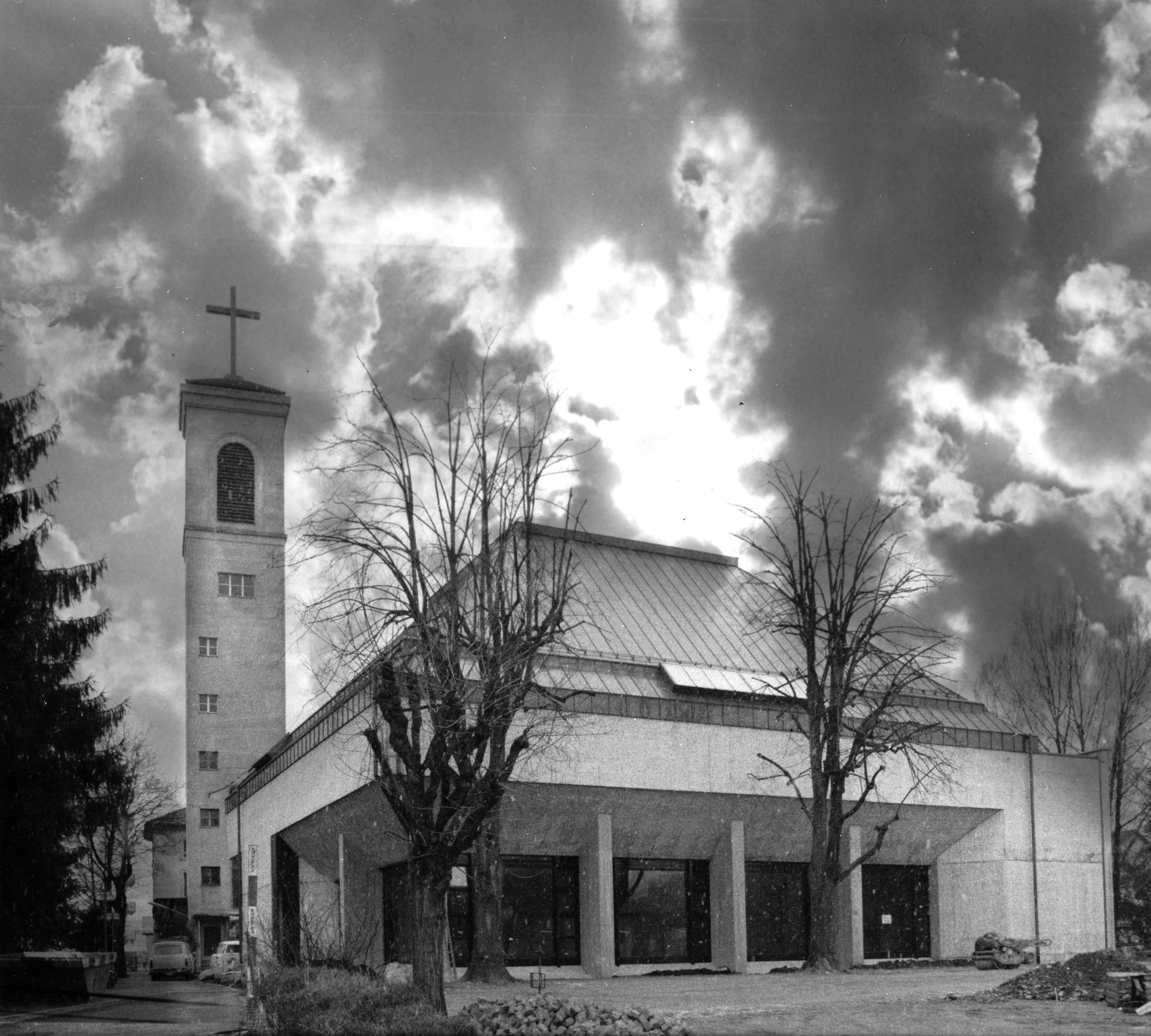 Römisch-katholische Pfarrei Heilig Kreuz Zürich-Altstetten, Aussenansicht des Neubaus 1979